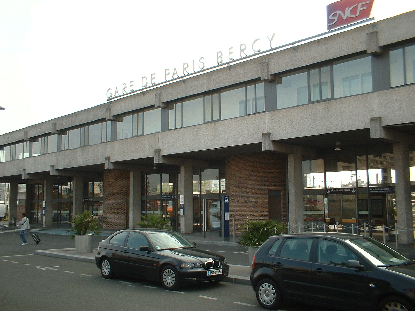 Voorzijde van het spoorwegstation Gare de Paris Bercy te Parijs. Parijs, Bercy